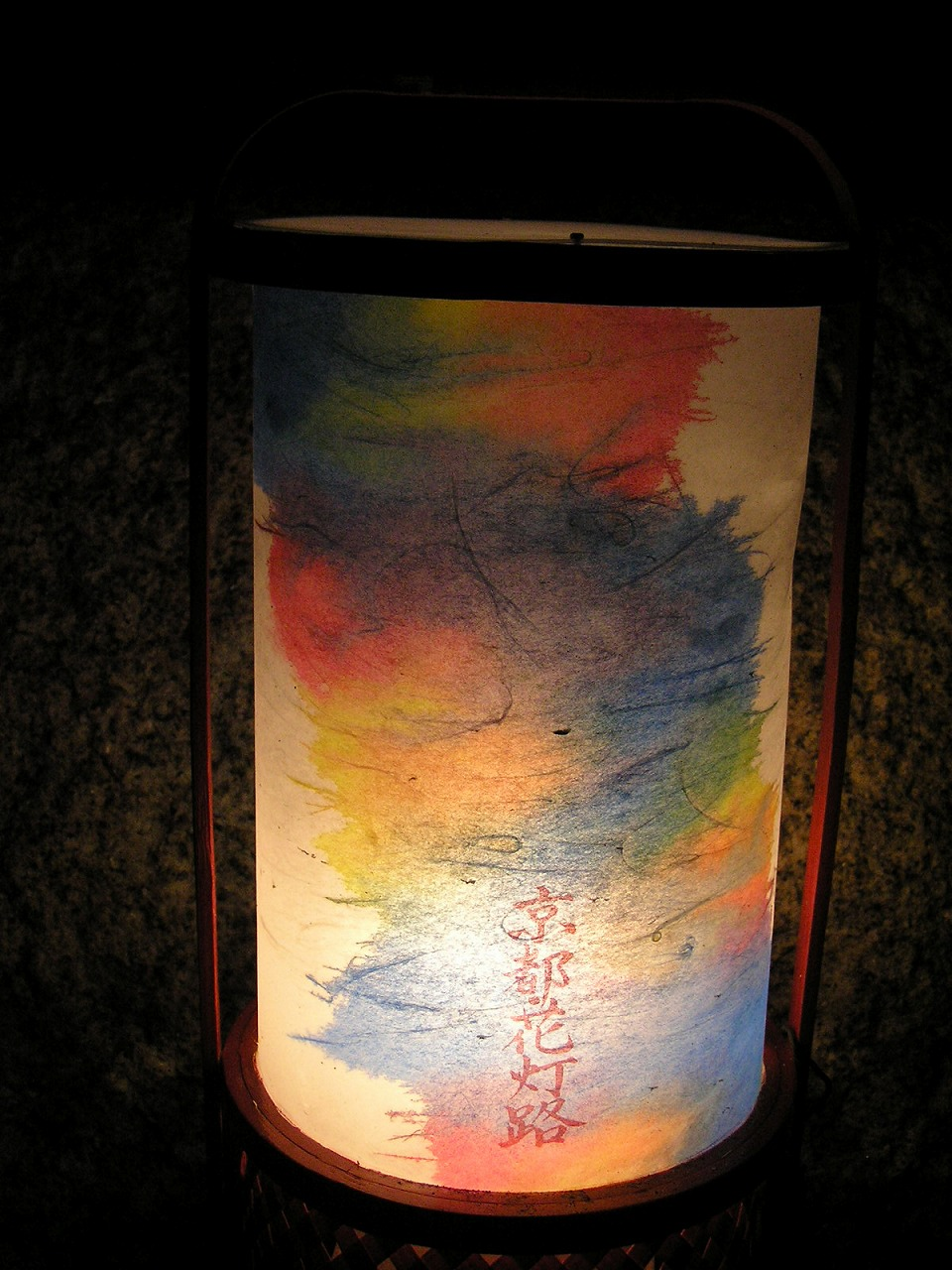 京都・東山花灯路清水坂